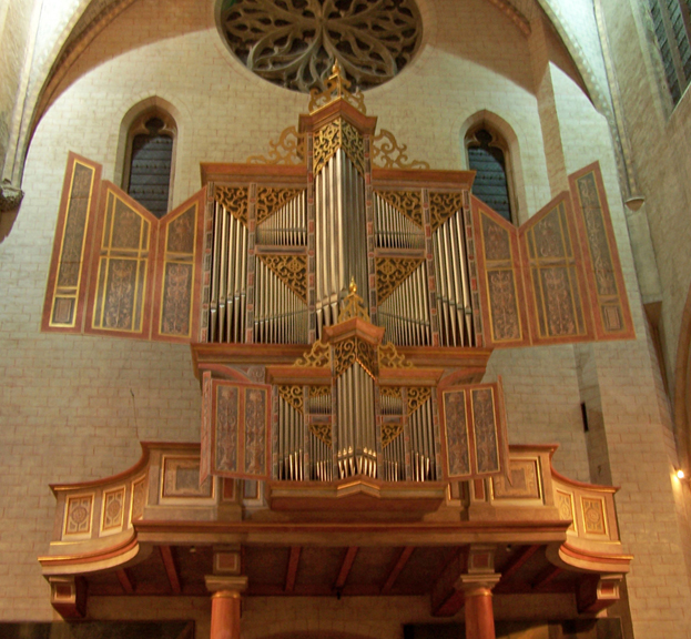 Orgue de la chapelle du musée des Augustins à Toulouse (France)